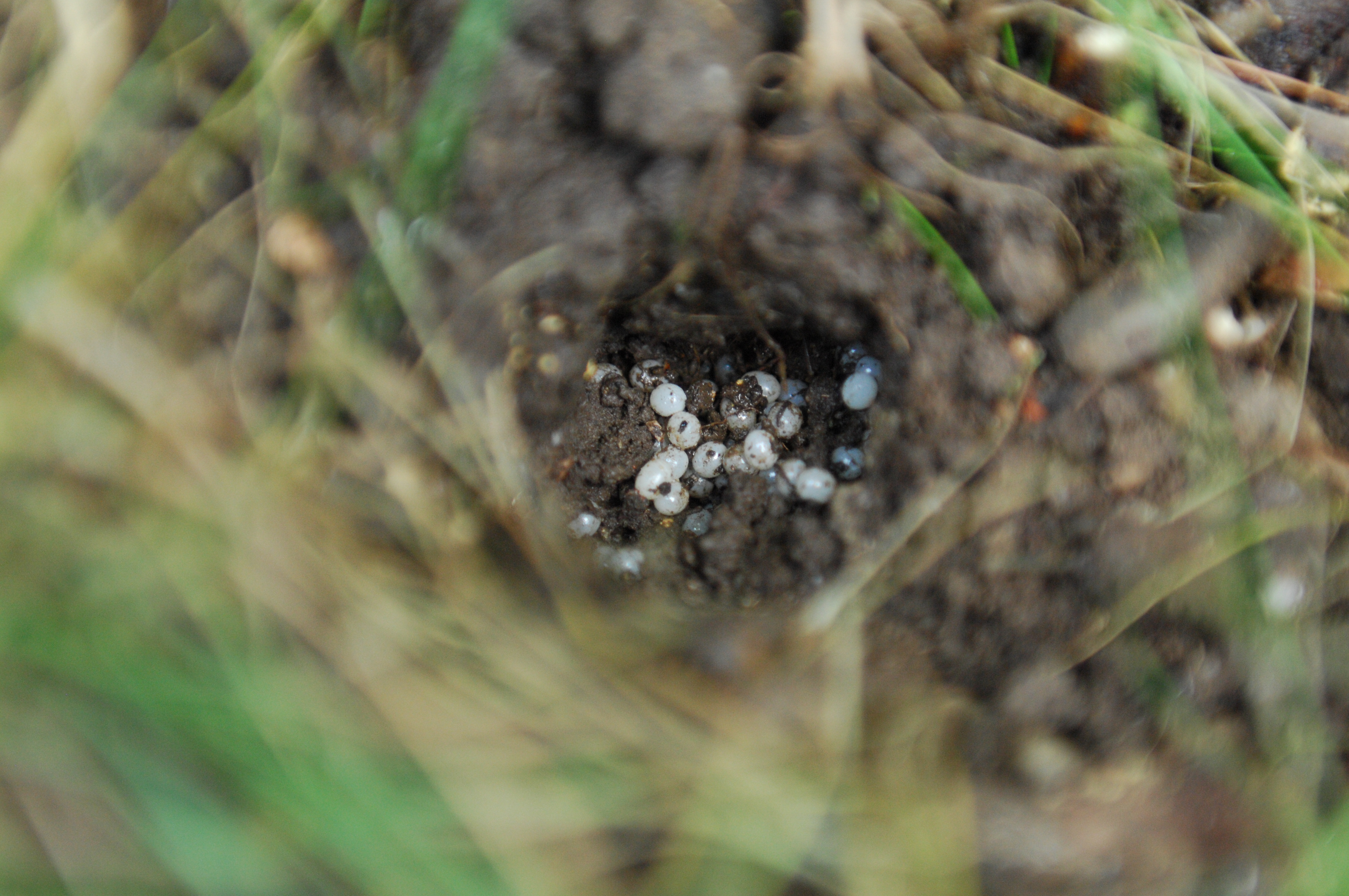 Des oeufs d'escargos